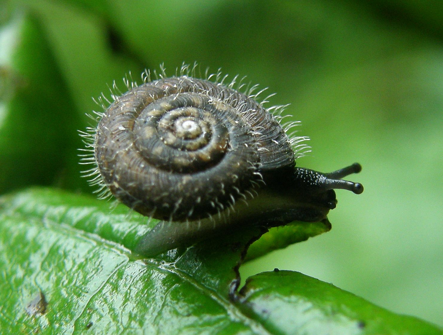 Haarschnecke. Aufnahmeort: Allgäuer Alpen Nähe Oberstdorf ca. 900 m Höhe